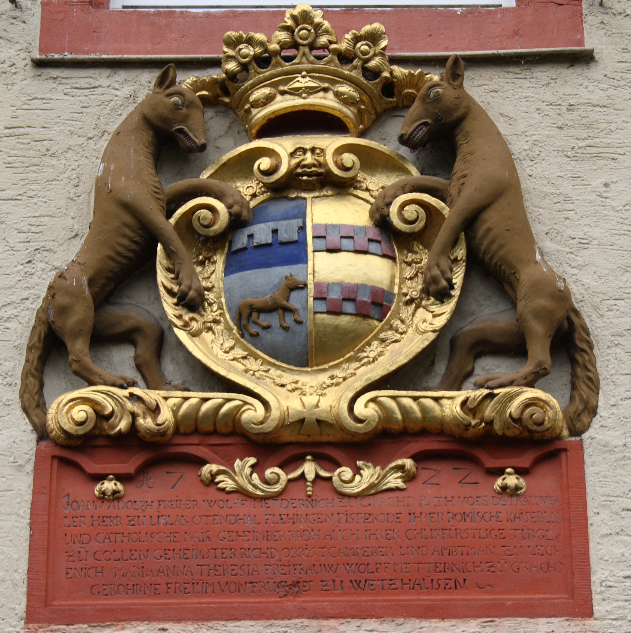 Wappen am Wasserschloss in Flehingen